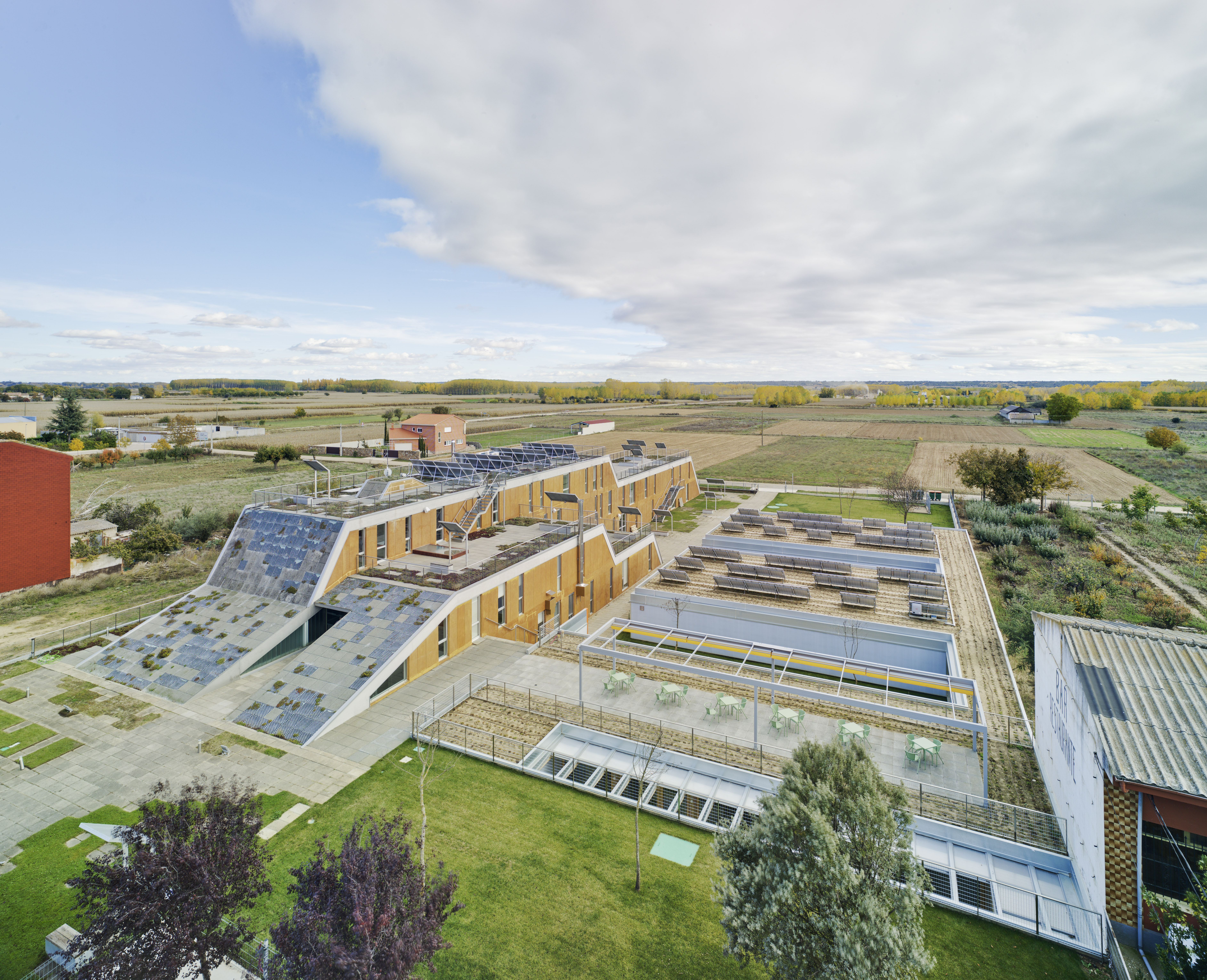 El primer edificio geriátrico-hospitalario de España ha sido certificado en el año 2019 en Camarzana de Tera (Zamora).